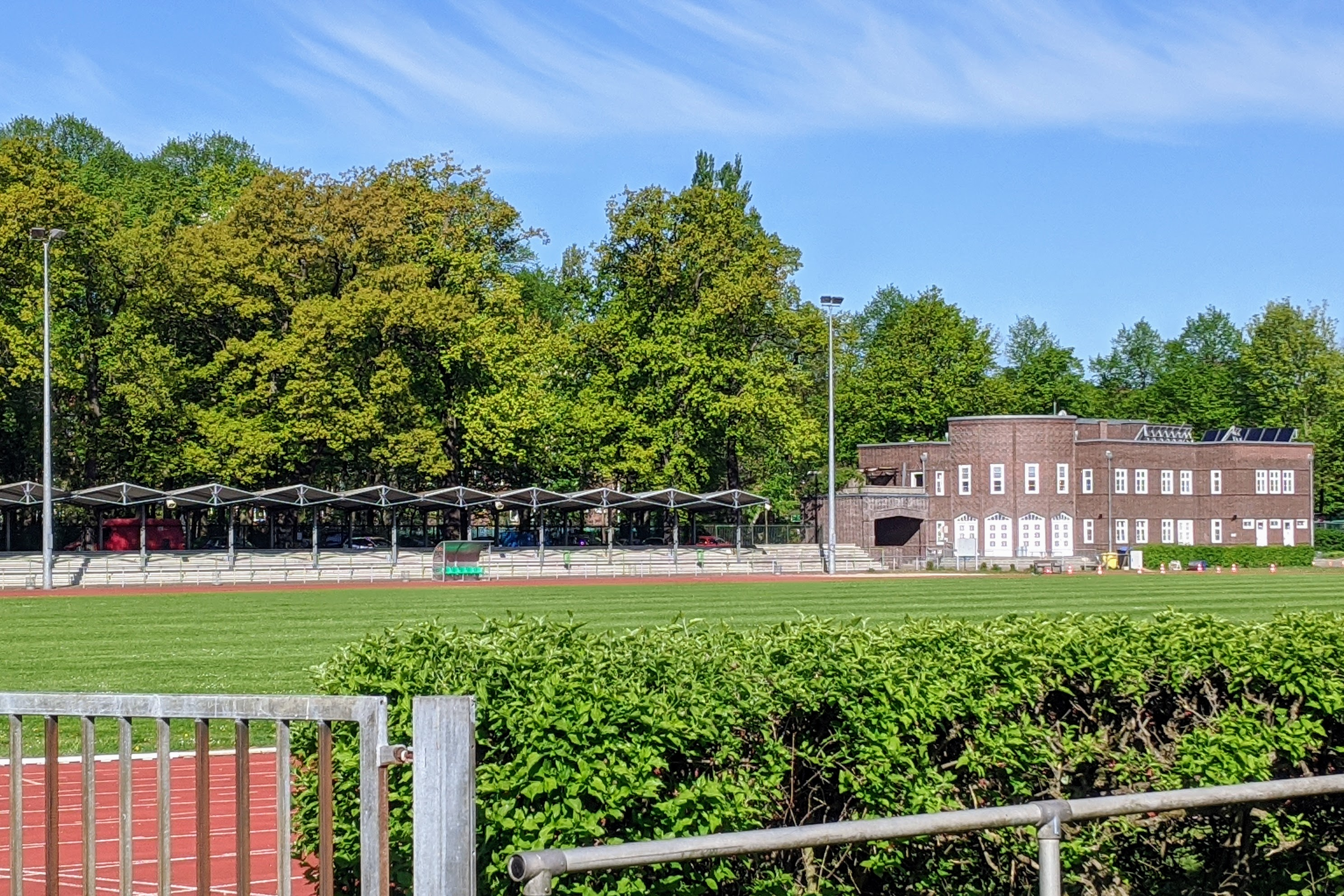 Hammer Park in Hamburg, Stadion mit Tribüne und Sportlerhaus